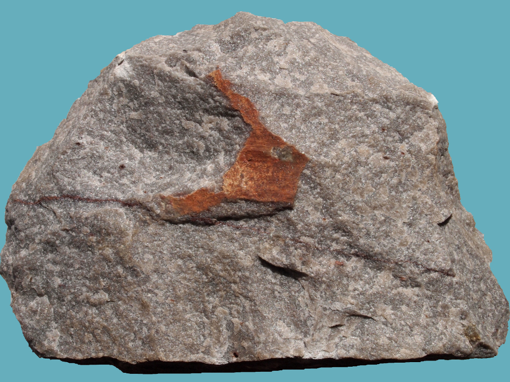 Ordovický křemenec z jižního okolí Řevnic. Skutečná šířka je 120 mm.